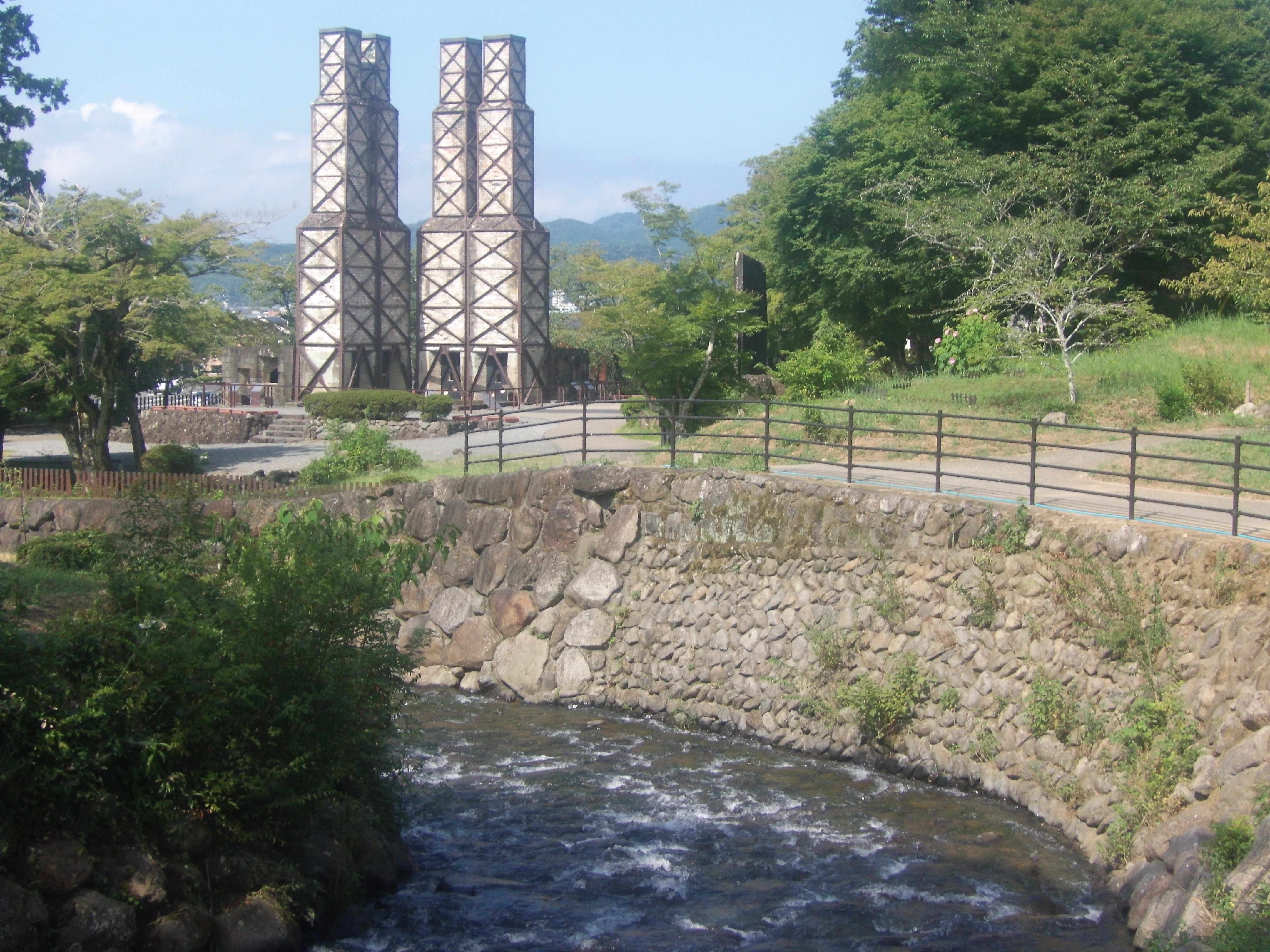 世界遺産「明治日本の産業革命遺産」構成資産の韮山反射炉に含まれる韮山古川。